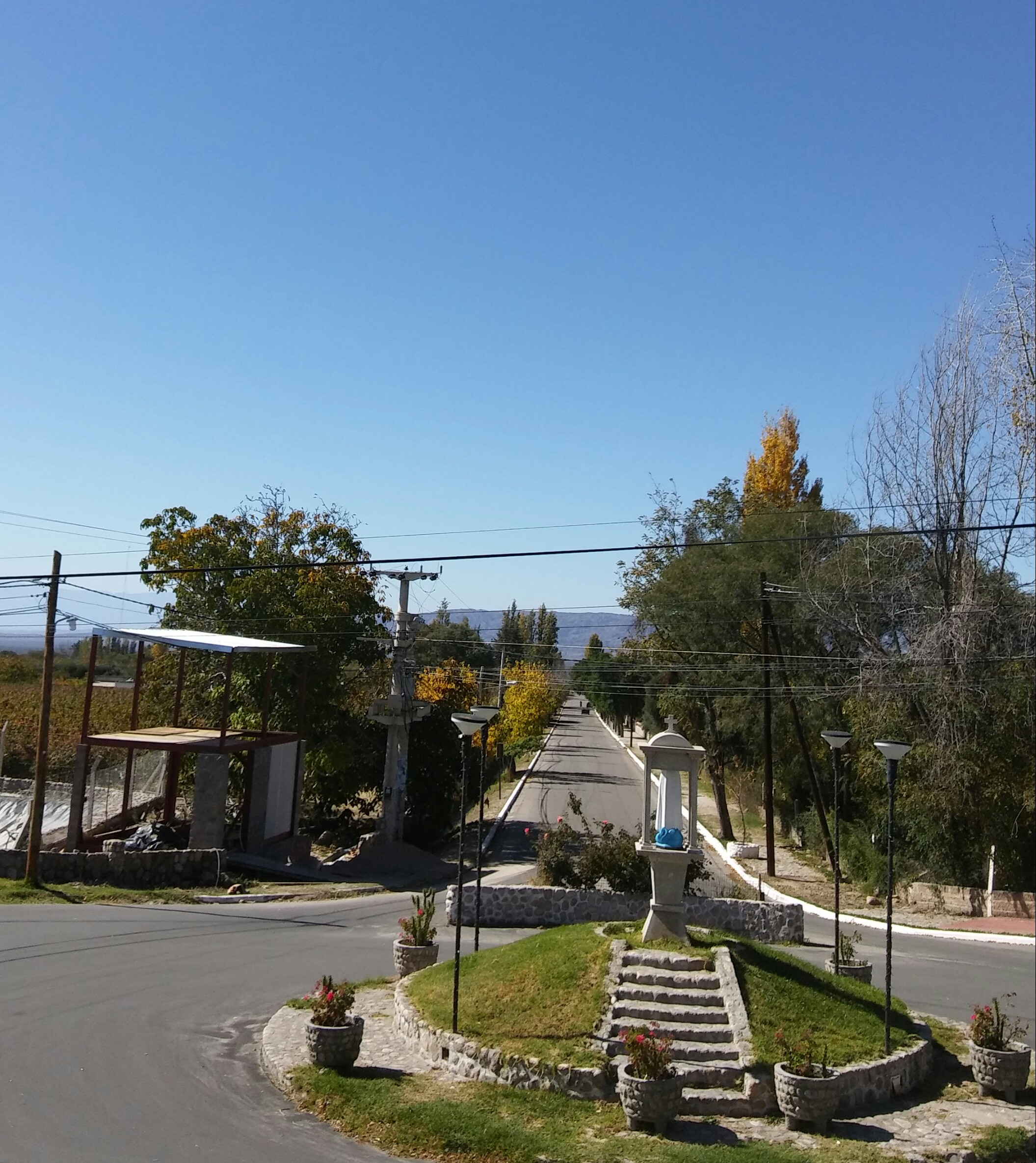 Vista aérea de la rotonda de la Virgen de Fátima. Calle principal.